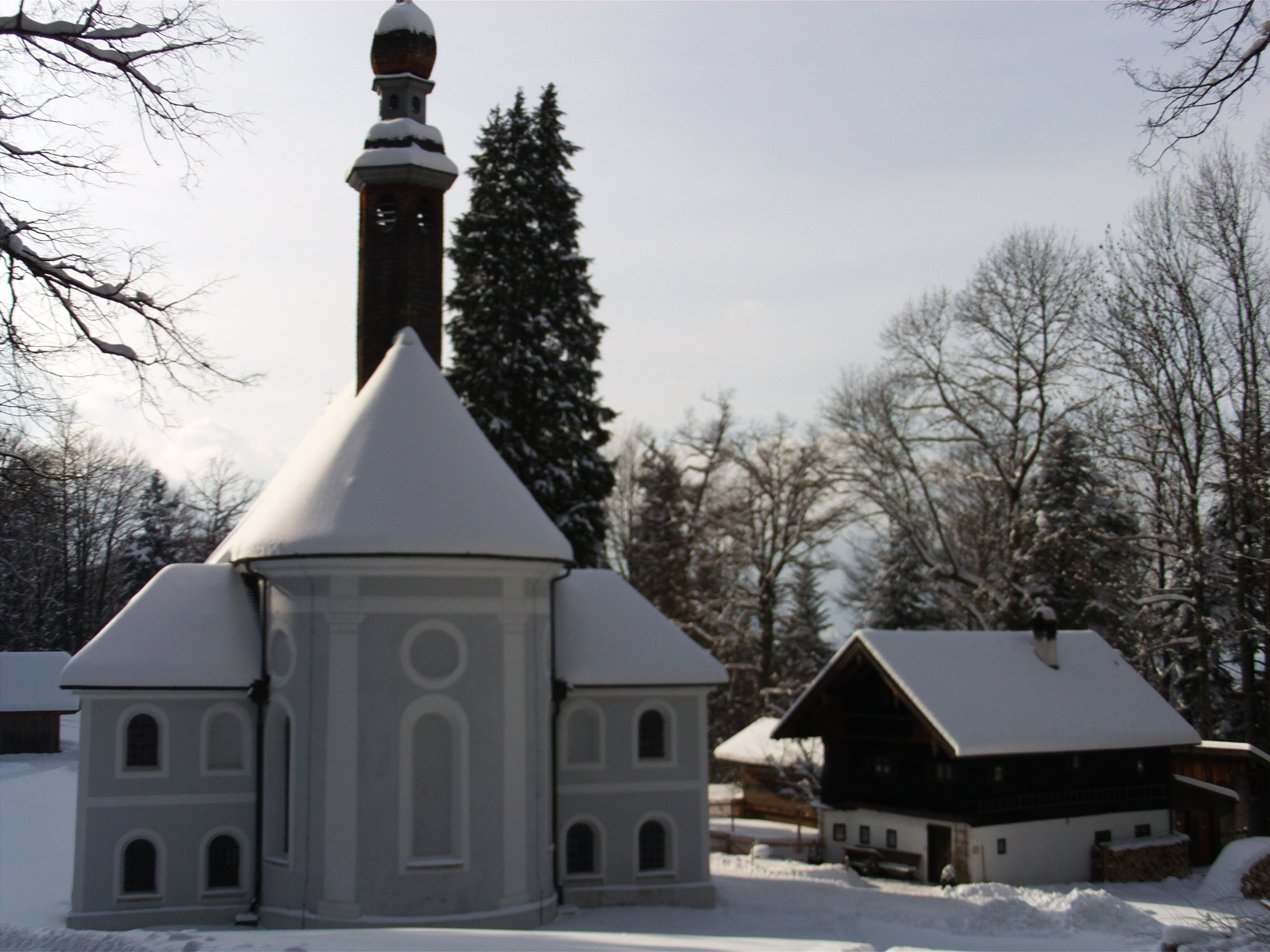 Wallfahrtskirche Mariä Heimsuchung (Kirchwald) im Schnee